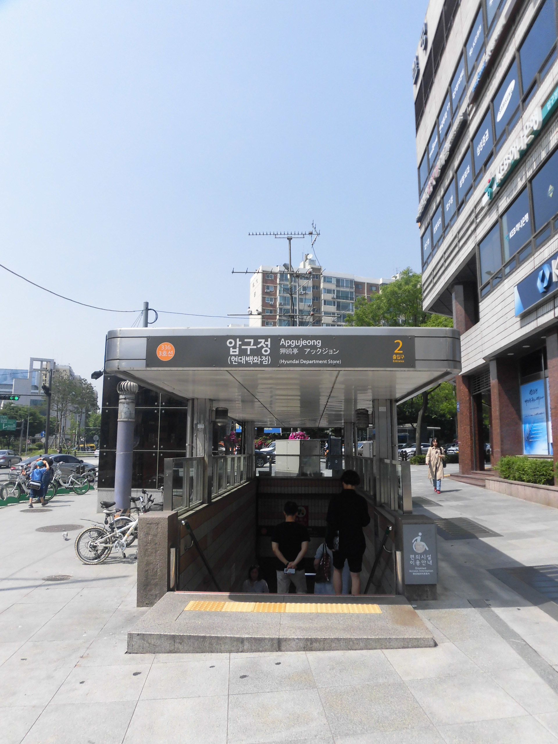 서울교통공사 3호선 압구정역 2번출구